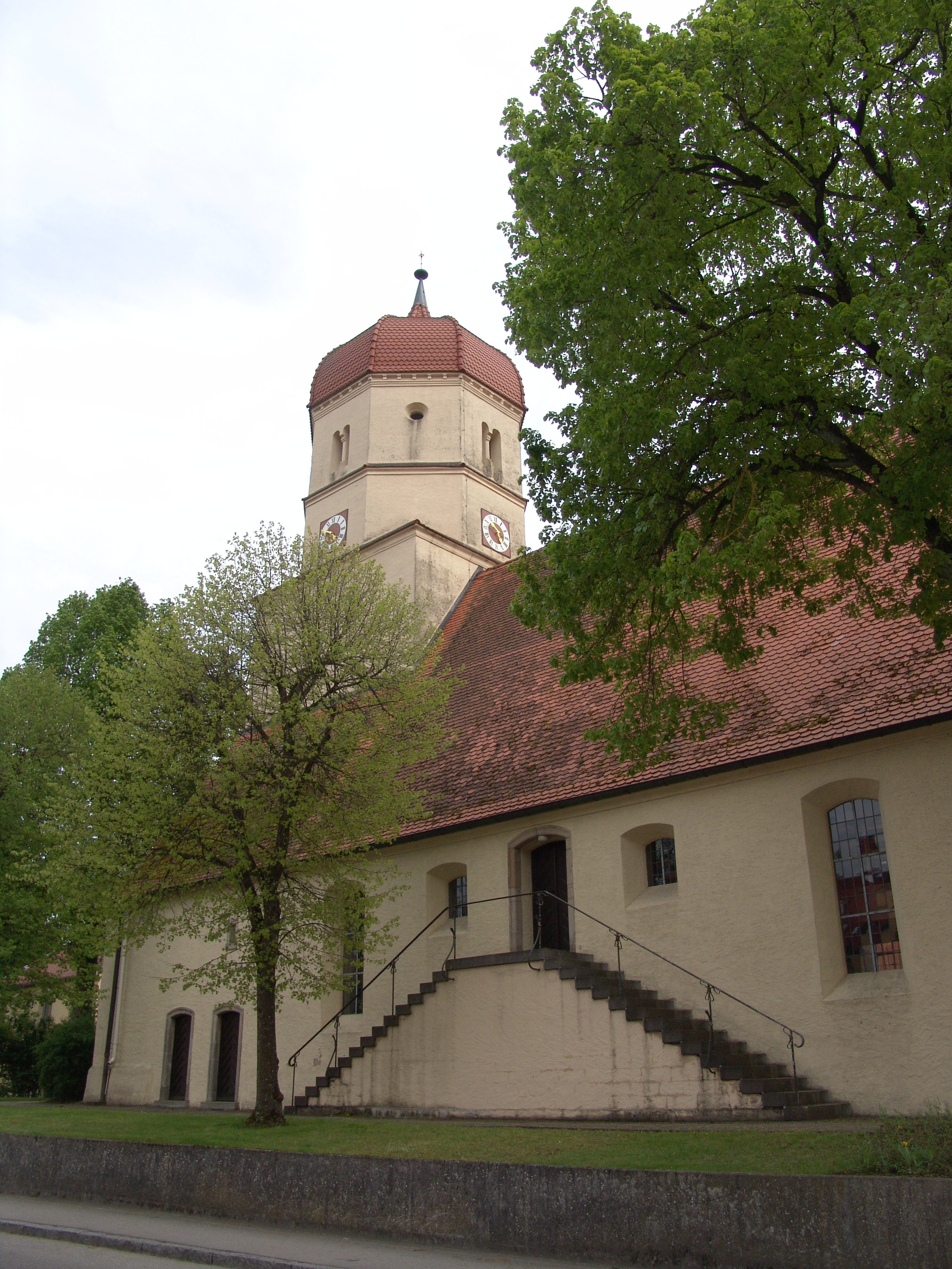 evang.-luth. Dorfkirche St. Oswald und Aegidius in Mönchsroth